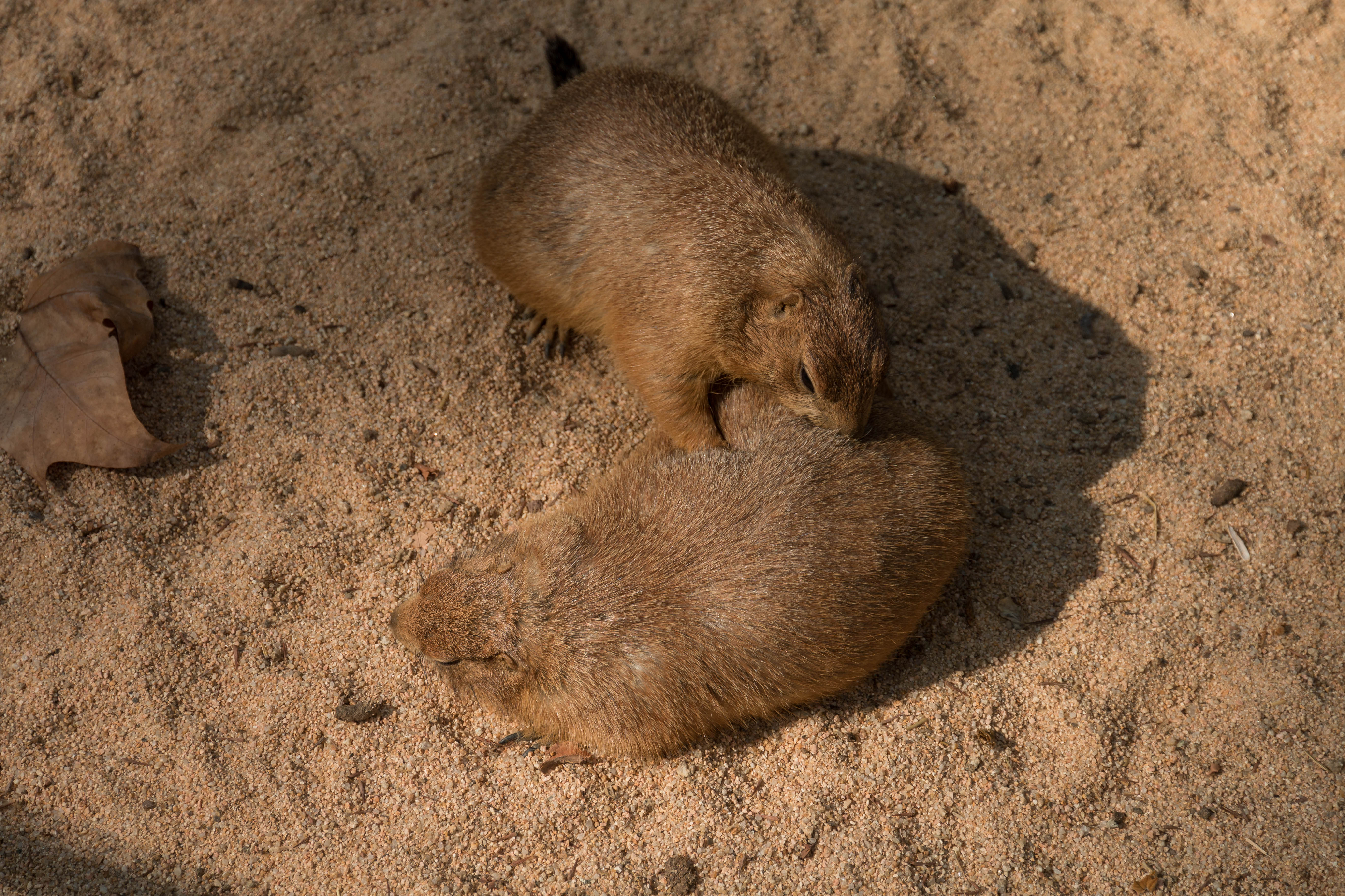 Cynomys ludovicianus (Schwarzschwanz-Präriehund)